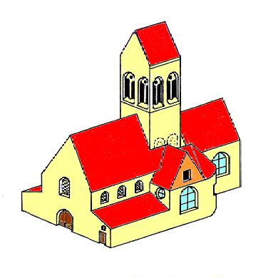 Reconstitution de l'église au 12e siècle